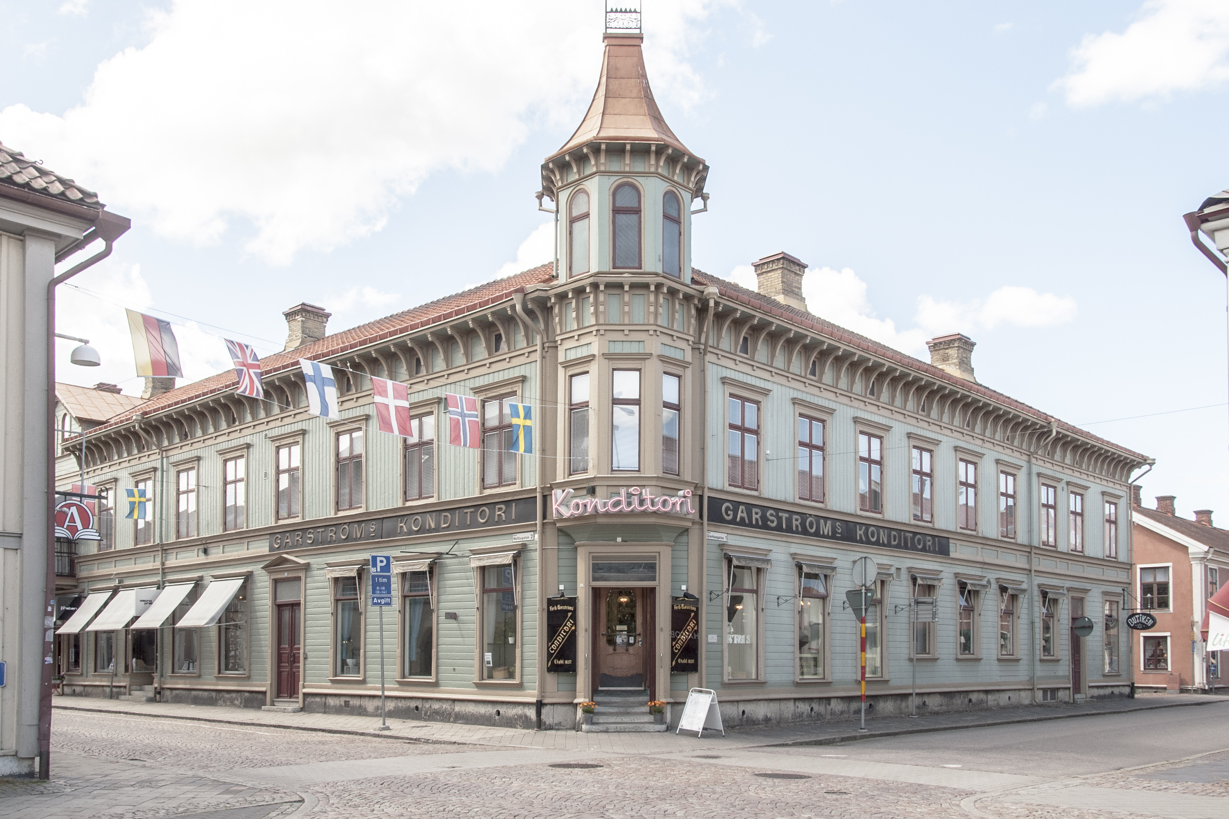 Garströms konditori i Lidköping. Byggnadsår 1886 för Carl Ferdinand Garström